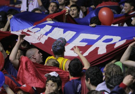 La numero 6, la hinchada de Union Atletica desde adentro una foto que muestra el centro de la hinchada